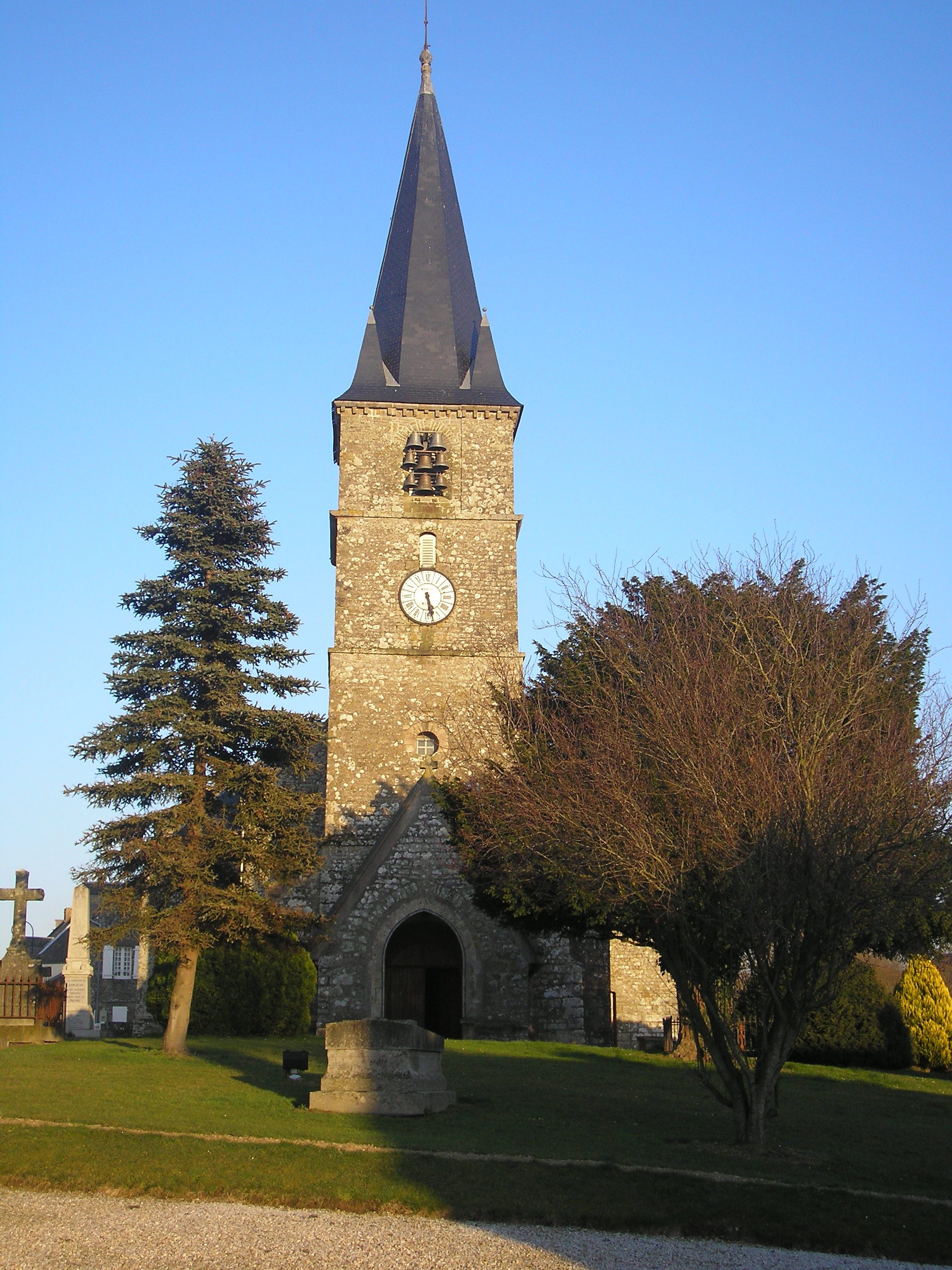 Domjean (Normandie, France). L'église Saint-Jean-Baptiste.